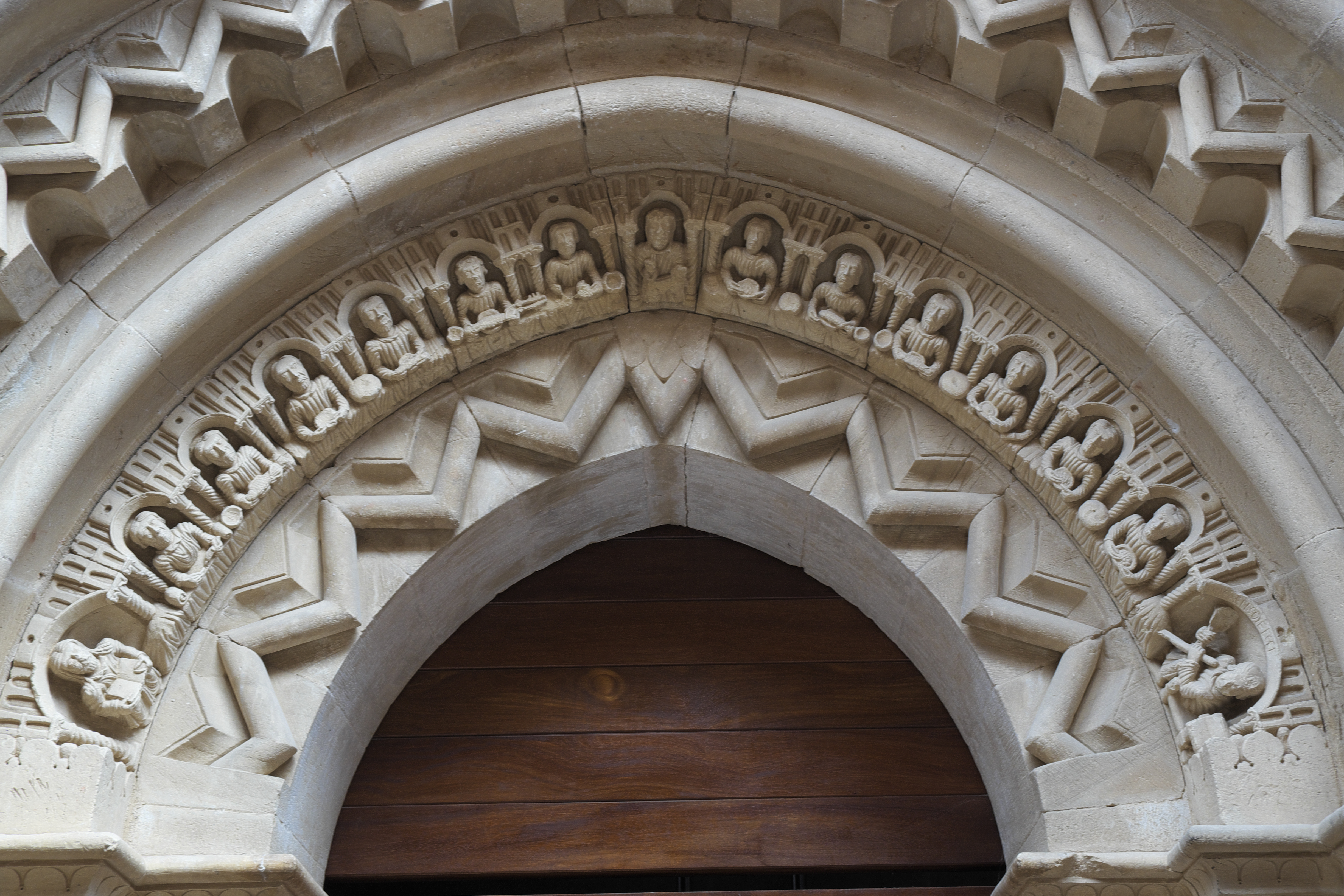 Kirche San Cornelio y San Cipriano in Revilla de Santullán in der Gemeinde Barruelo de Santullán in der Provinz Palencia (Kastilien-León/Spanien), Archivolten des Portals, Darstellung: Abendmahl